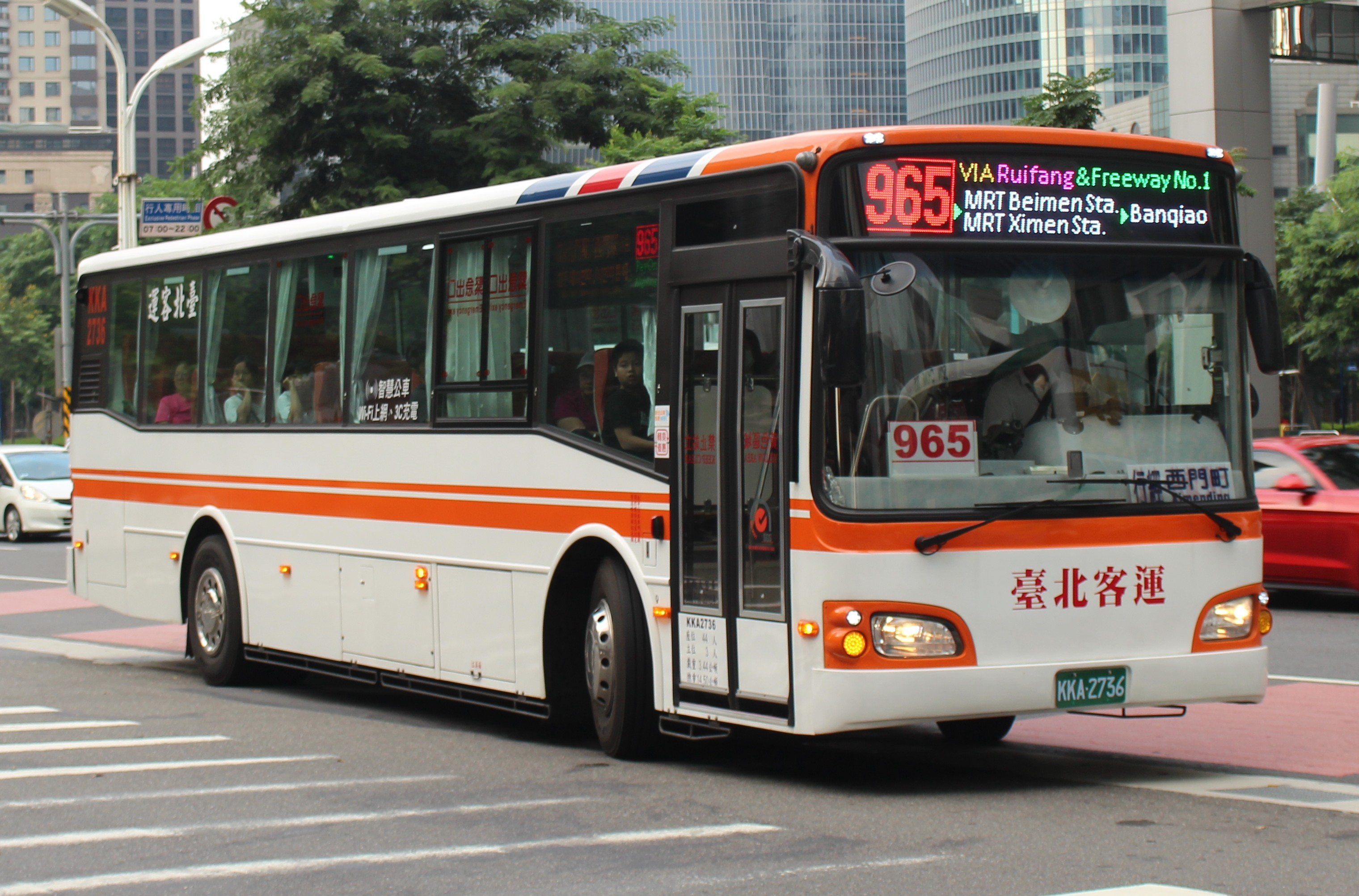 中文（台灣）: 臺北客運2018年日野RK8JRVA-KJF大客車KKA-2736，行駛965線。